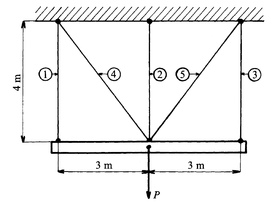 Poudre soutenu par 5 cables